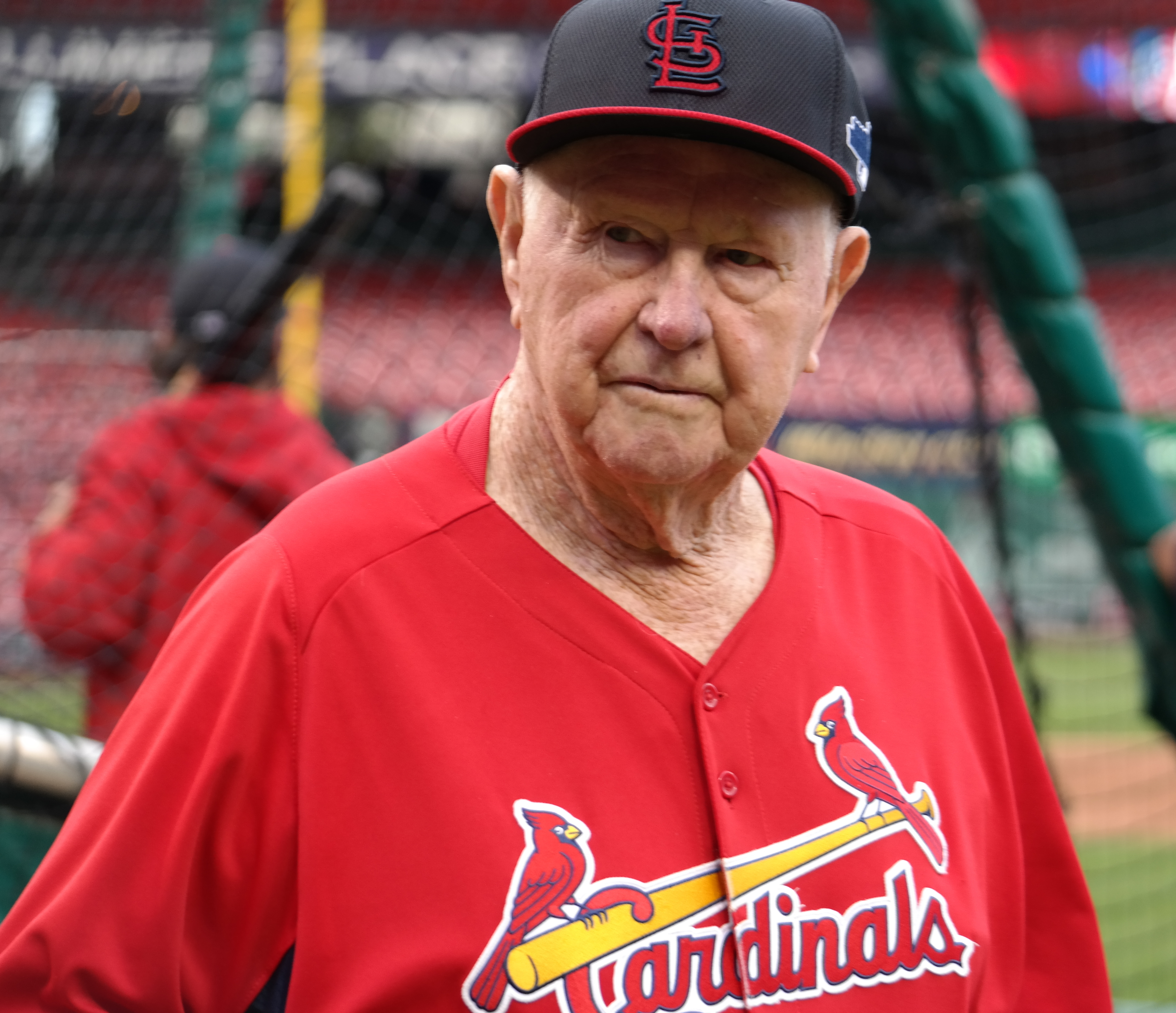 The legendary Albert Fred "Red" Schoendienst.